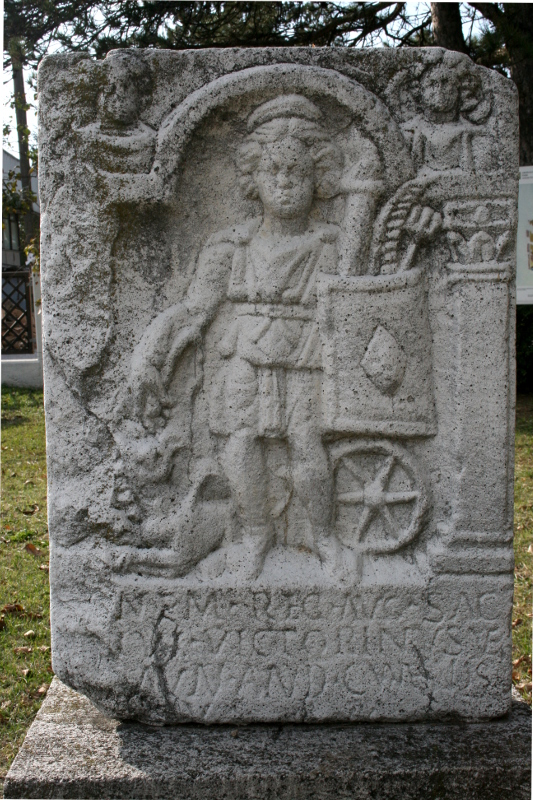 Reljef božice Nemeze, Andauntonija